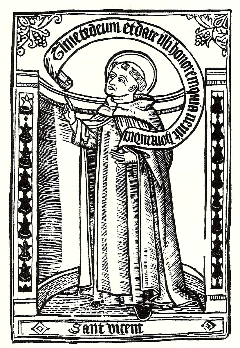 Sant Vicent Ferrer, gravat de la portada de la Vida de Sant Vicent Ferrer escrita per Miquel Péreç